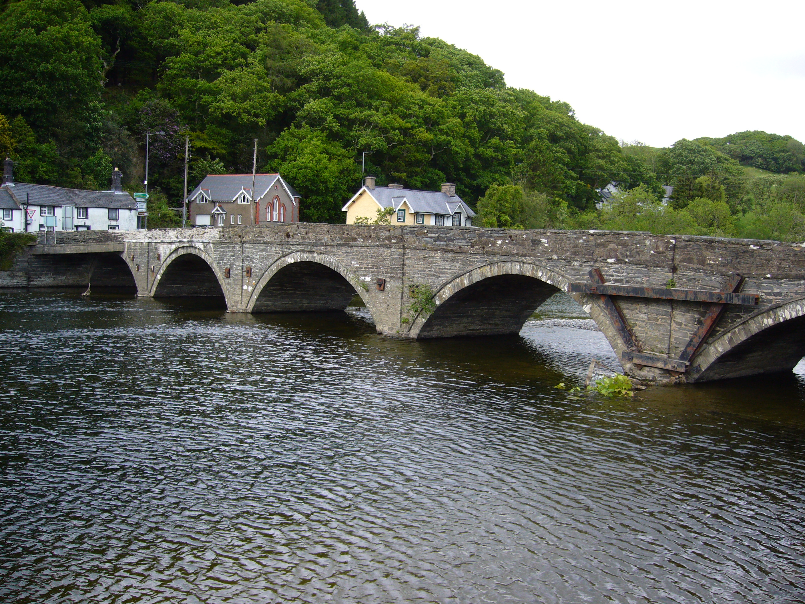 Machynlleth